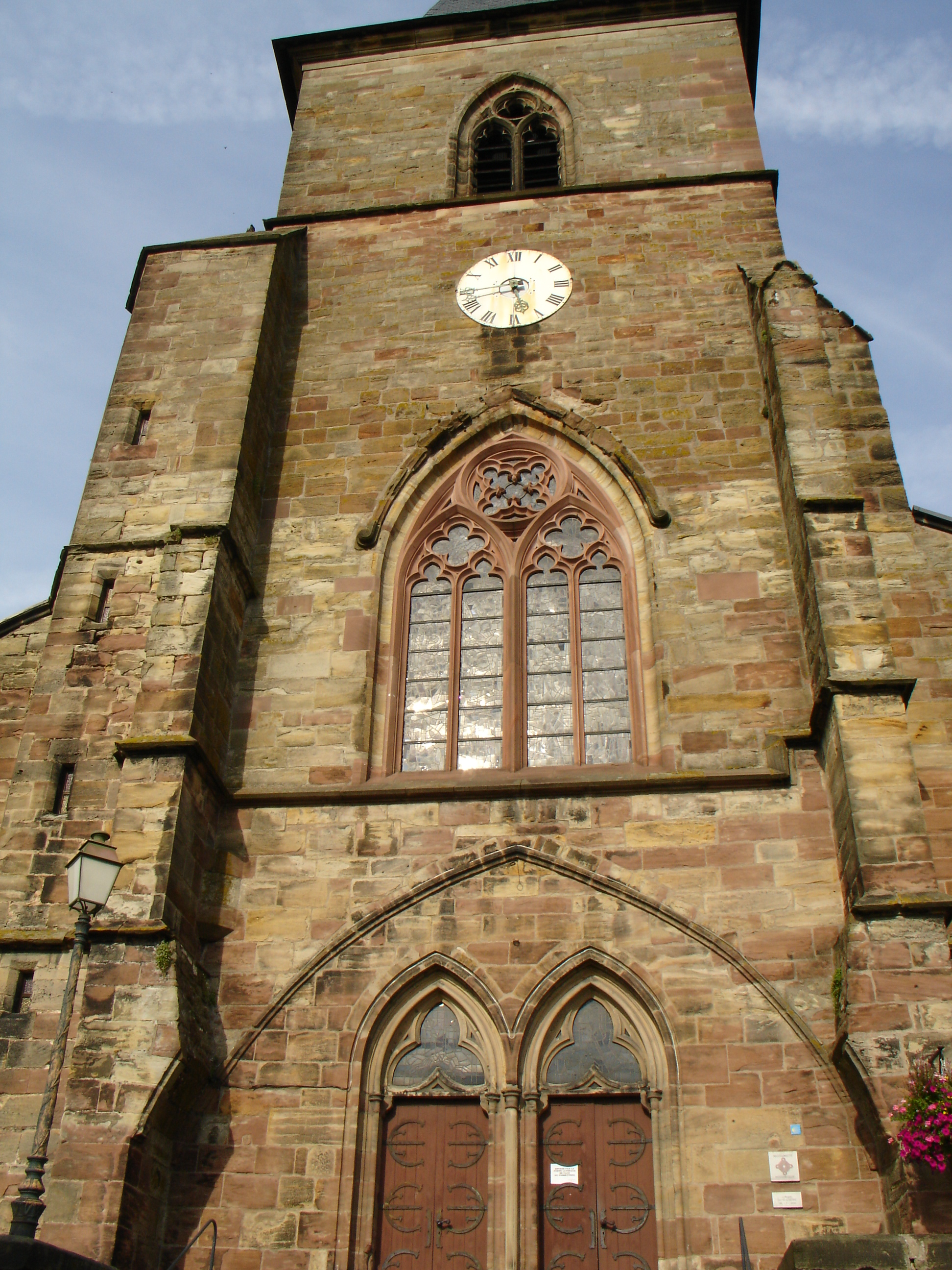 L'Église collégiale Saint-Étienne de Hombourg-Haut (située dans le Vieux-Hombourg).